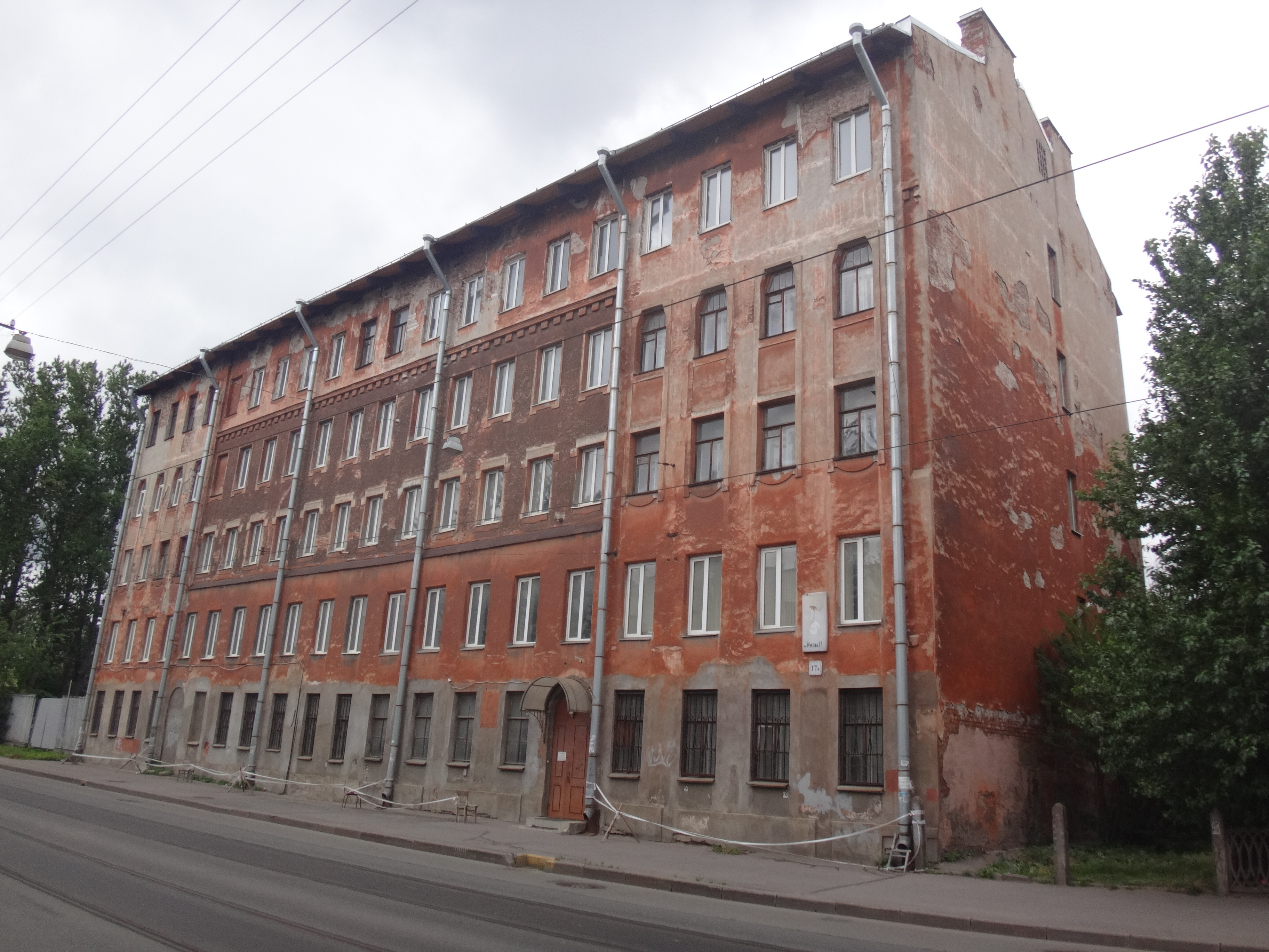 ВТУЗ-ЛМЗ (красный корпус)